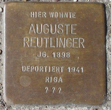 Deutschland (D) - Baden-Württemberg (BW) - Landkreis Esslingen (ES) - Kirchheim unter Teck: Stolperstein für 'Auguste Reutlinger'